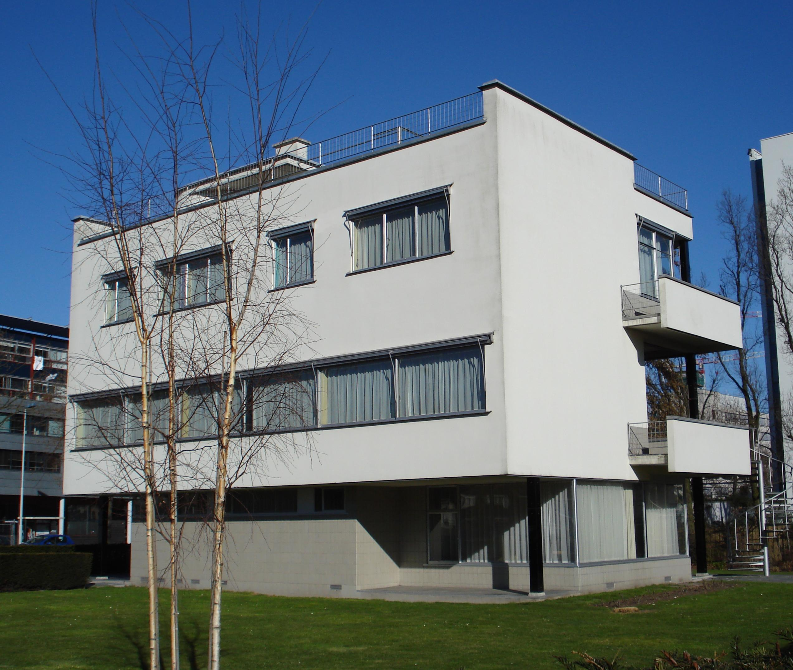 Rotterdam, Villa Sonneveld. Rijksmonument.